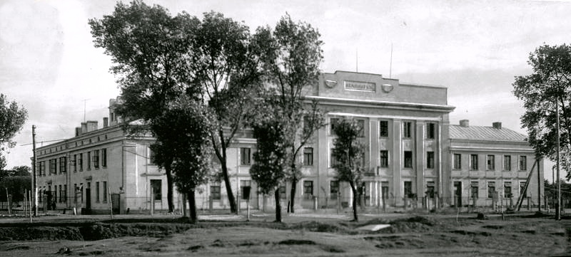 Беларуская (тарашкевіца): Будынак староства ў Маладэчне, які разьмяшчаўся на вуліцы Лібава-Роменскай